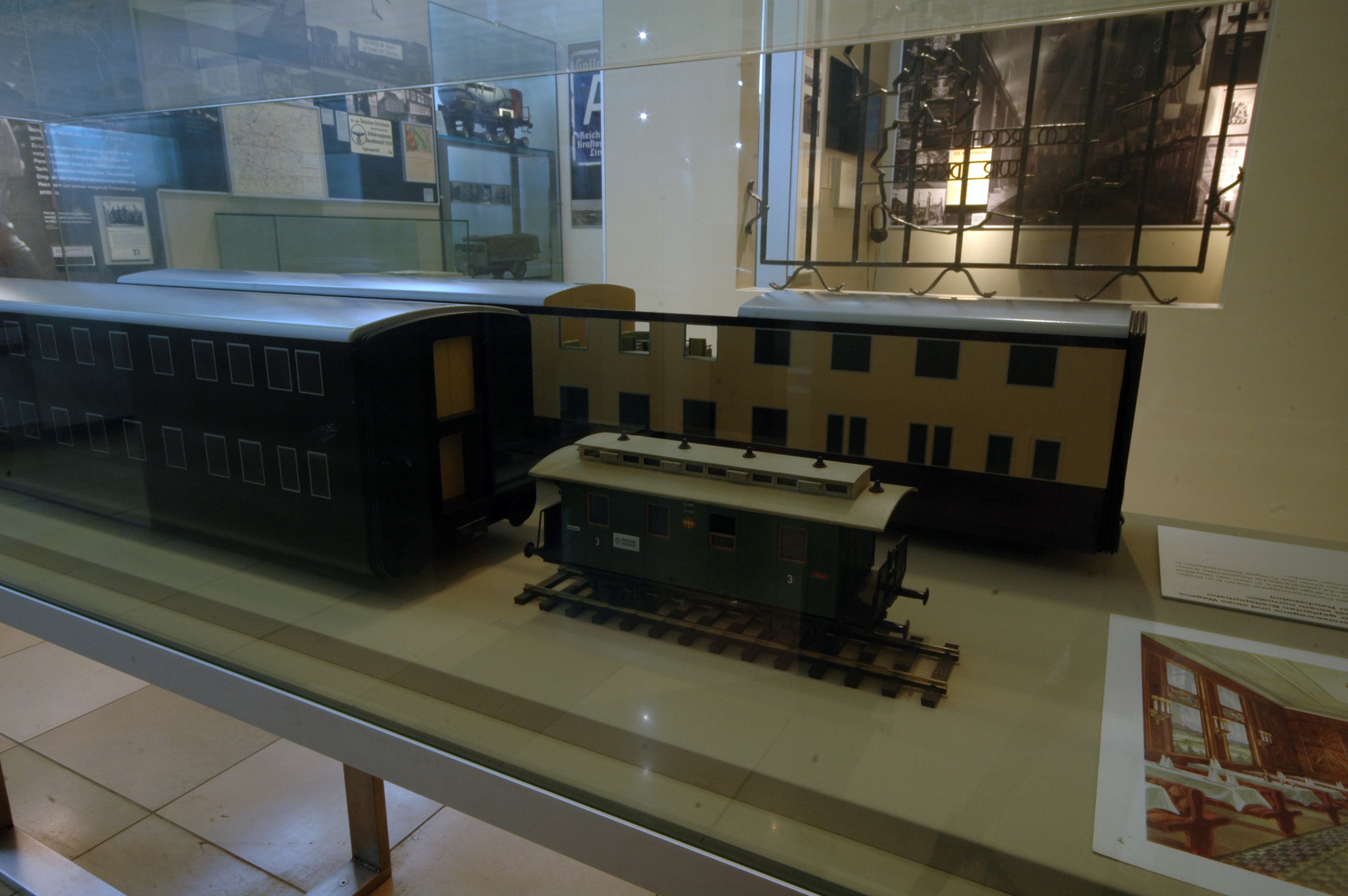 Verkehrsmuseum Nürnberg